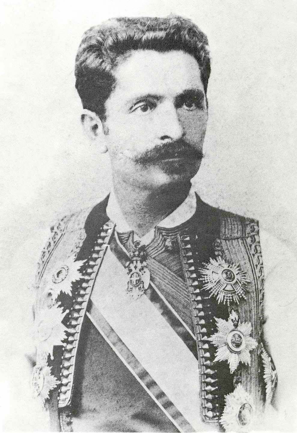 Srpski (latinica): Gavro Miljanov Vuković (1852 – 1928) vojvoda.